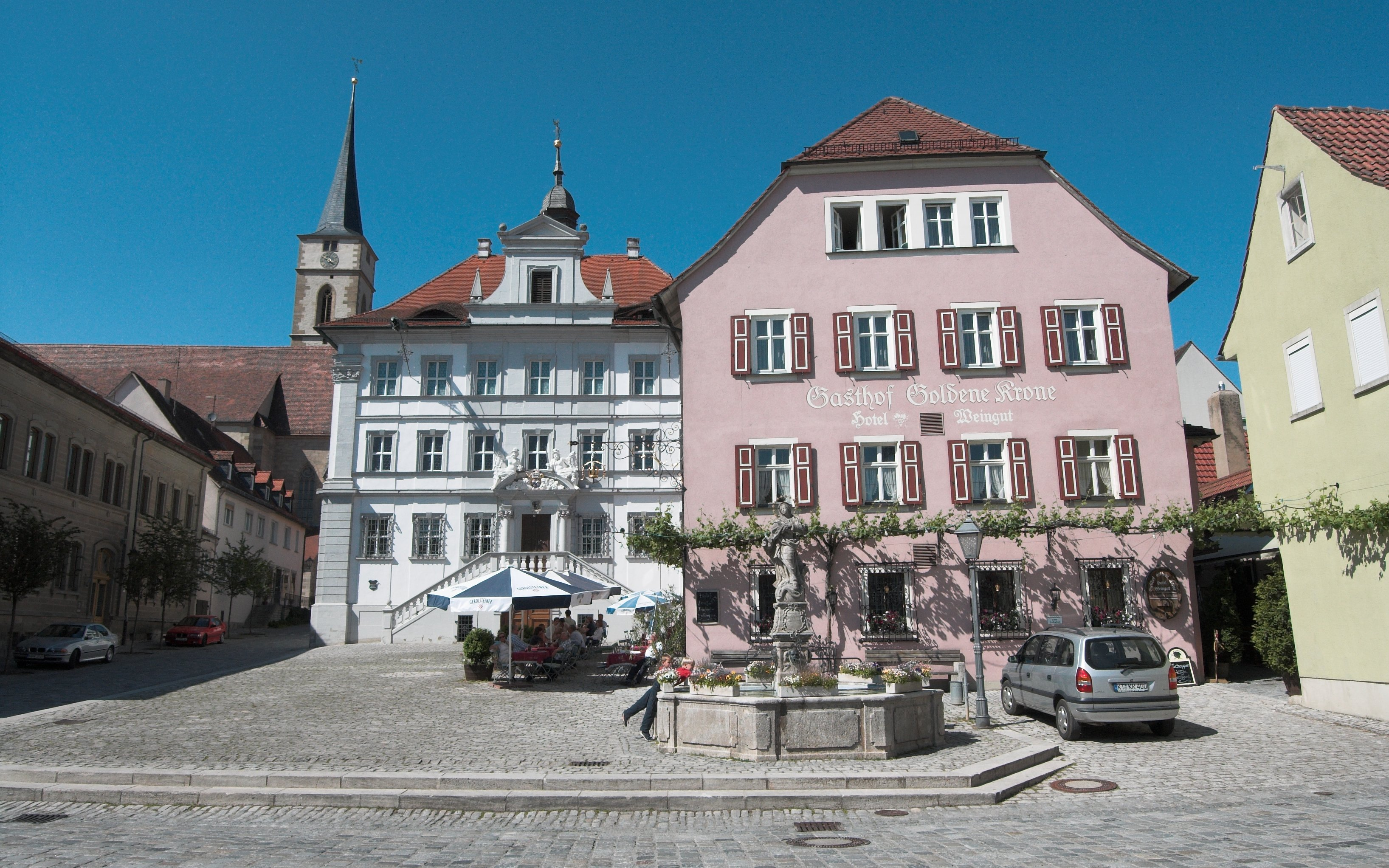 Marktplatz mit Marienbrunnen in Iphofen